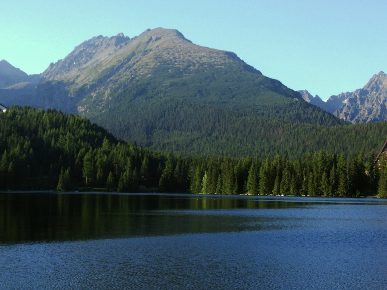 Skrajna Baszta. Widok znad Szczyrbskiego Jeziora